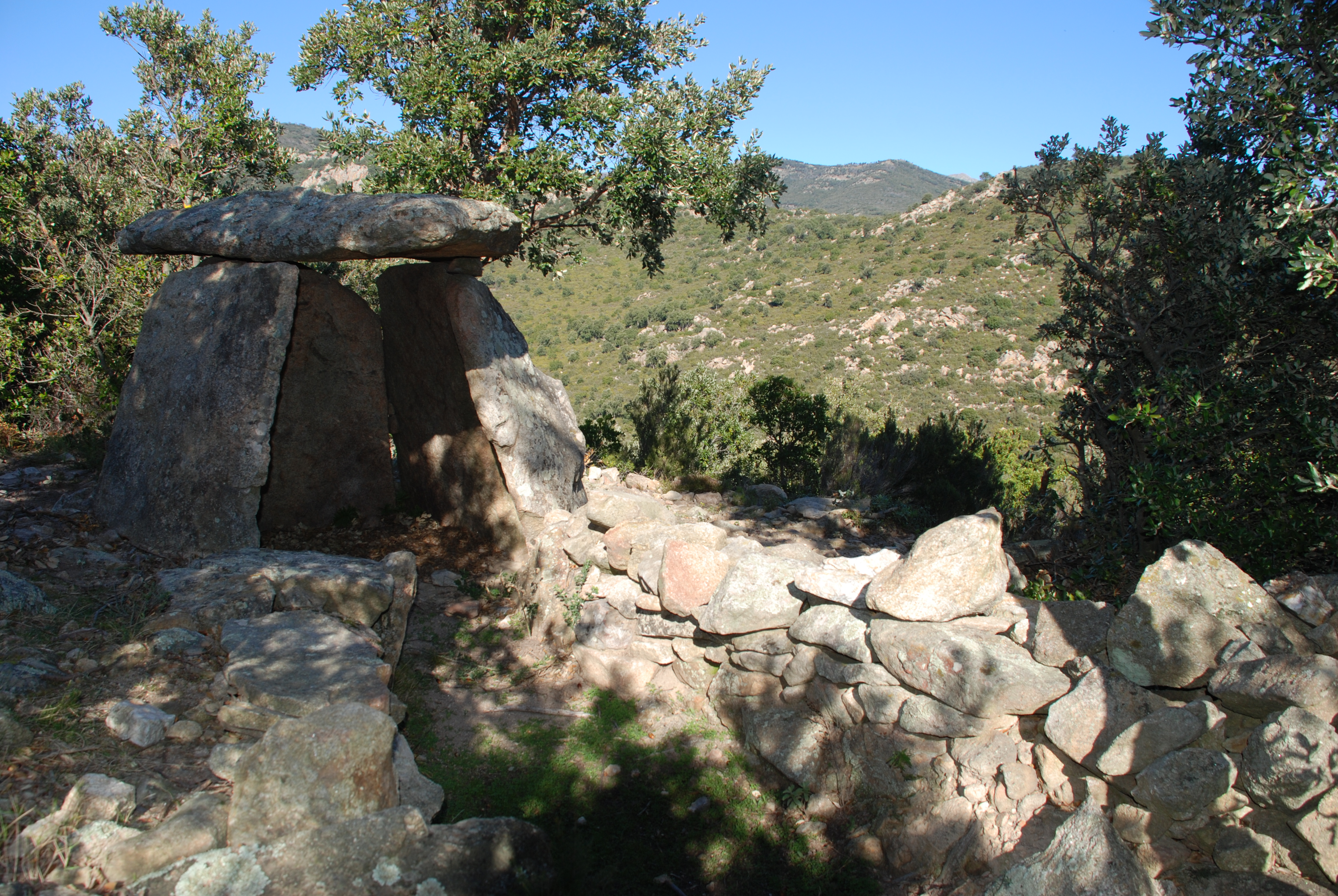 Dolmen sepulcre d'Arreganyats